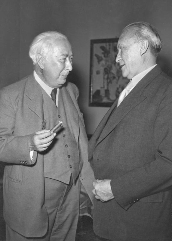 Bundespräsident und Bundeskanzler in Villa Hammerschmidt Bonn, 17.9.1953